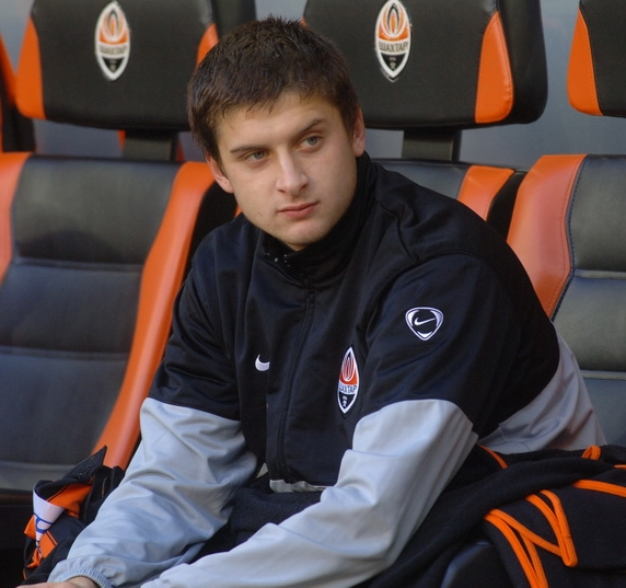 Ярослав Владимирович Ракицкий — украинский футболист.